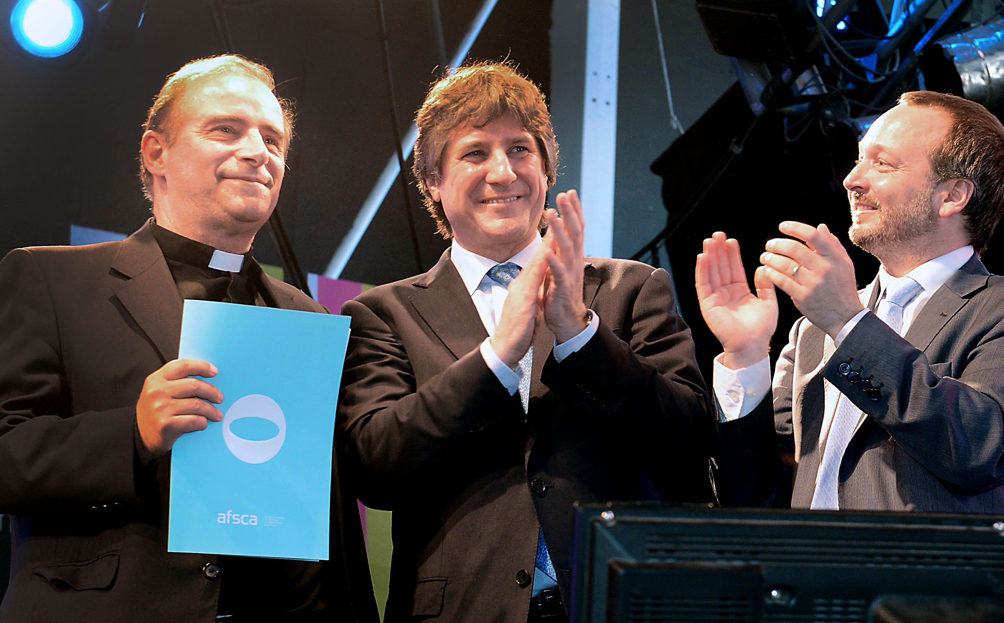 El vicepresidente, Amado Boudou, y el titular de la Autoridad Federal de Servicios de Comunicación Audiovisual (Afsca), Martín Sabbatella, encabezaron este mediodía la celebración de los cuatro años de la sanción de la Ley de Servicios de Comunicación Audiovisual. Durante el acto, que se desarrolló en el auditorio de Cultura de Tecnópolis, en Villa Martelli, se hará una entrega simbólica de licencias adjudicadas en los últimos meses.